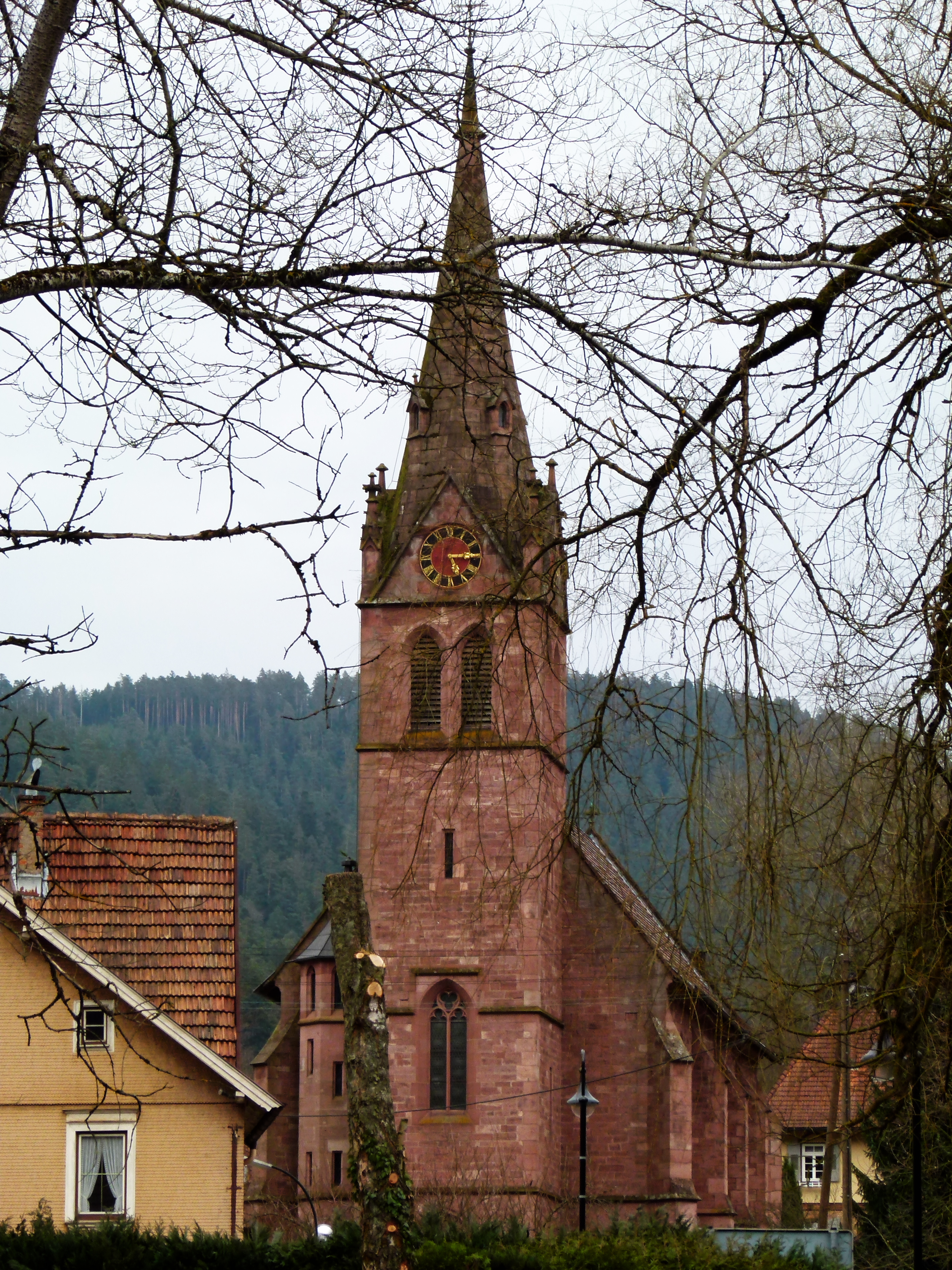 Church Of Höfen, in the background Langenbrander Höhe